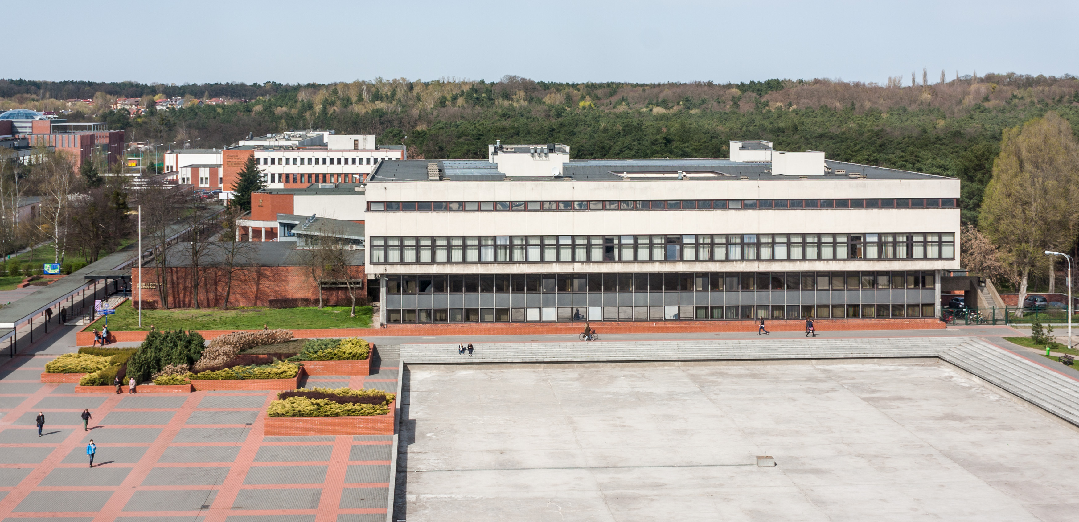 Biblioteka Głównka UMK w Toruniu, widok z budynku rektoratu.